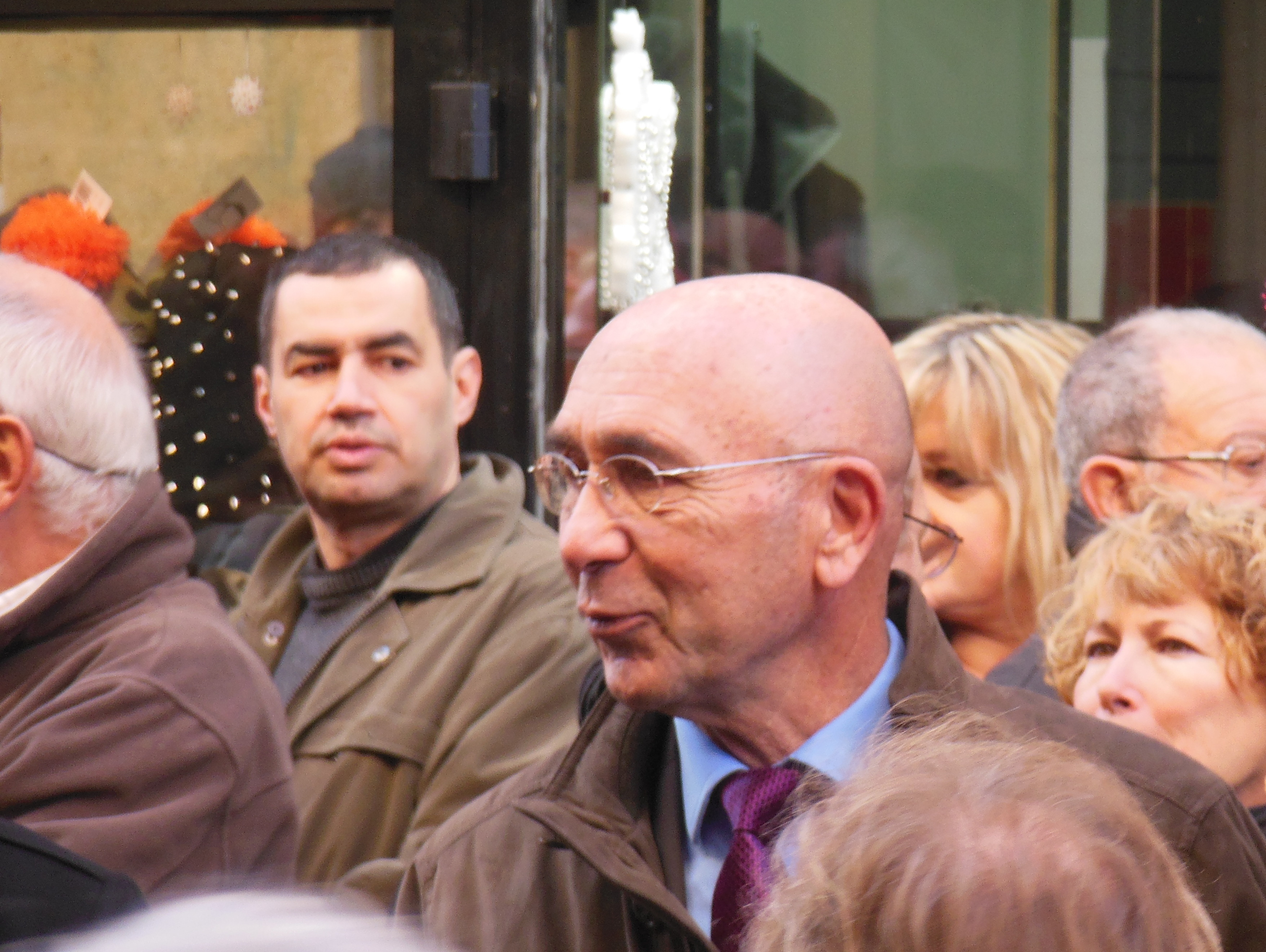 Inauguration de la permanence de campagne d'Édouard Baldo